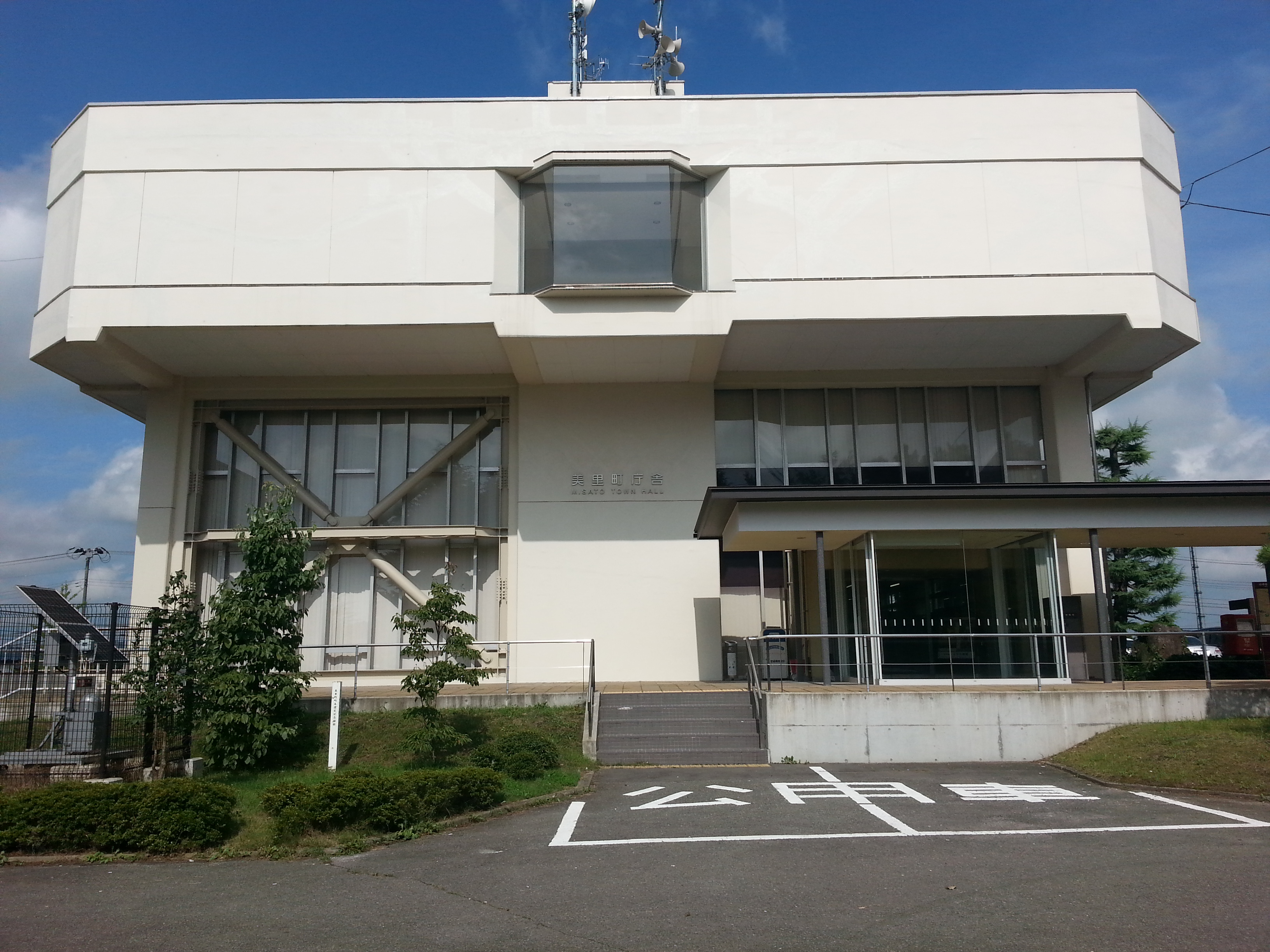 宮城県美里町 美里町役場